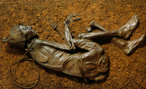 Zdroj